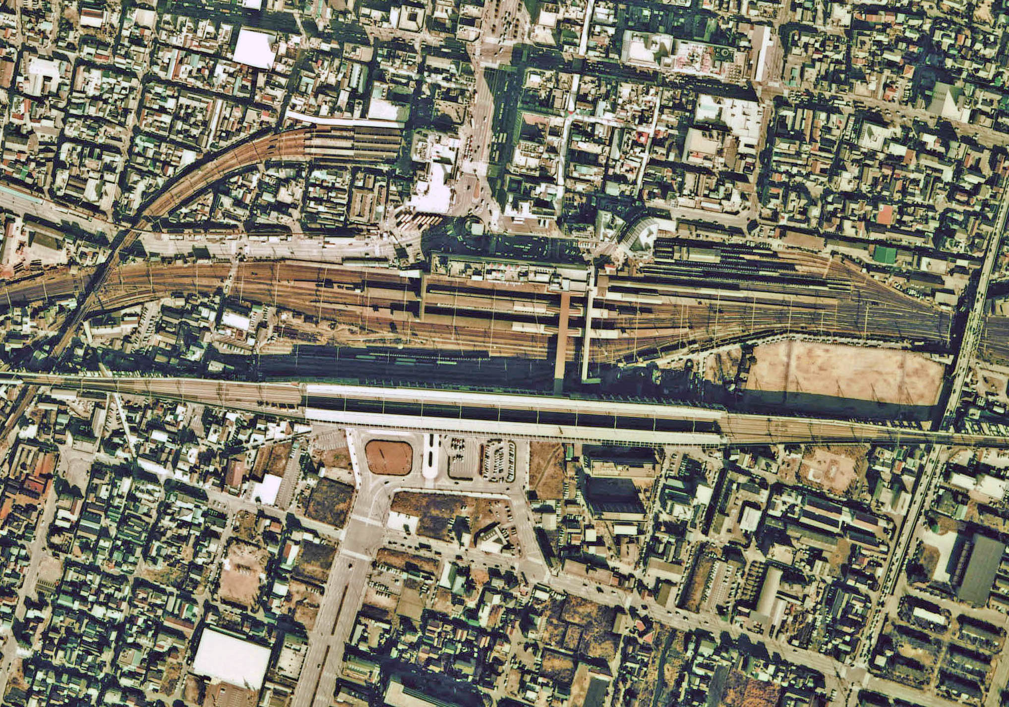 1974年のJR姫路駅の航空写真。参照元の地図からJR姫路駅周辺を切り抜き加工。